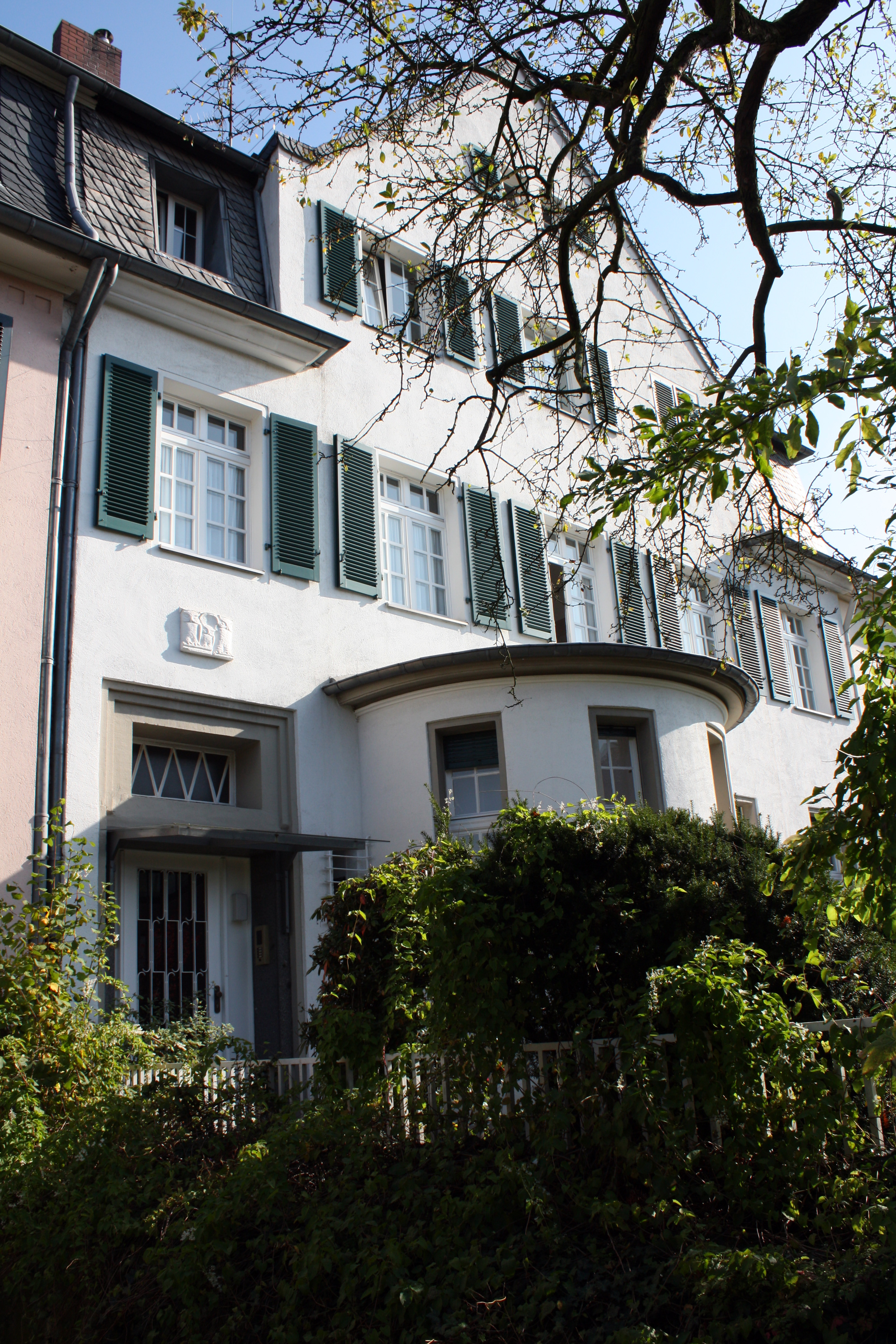 Ehemaliges Wohnhaus Konrad Adenauers, Köln-Lindenthal Max-Bruch-Straße 6